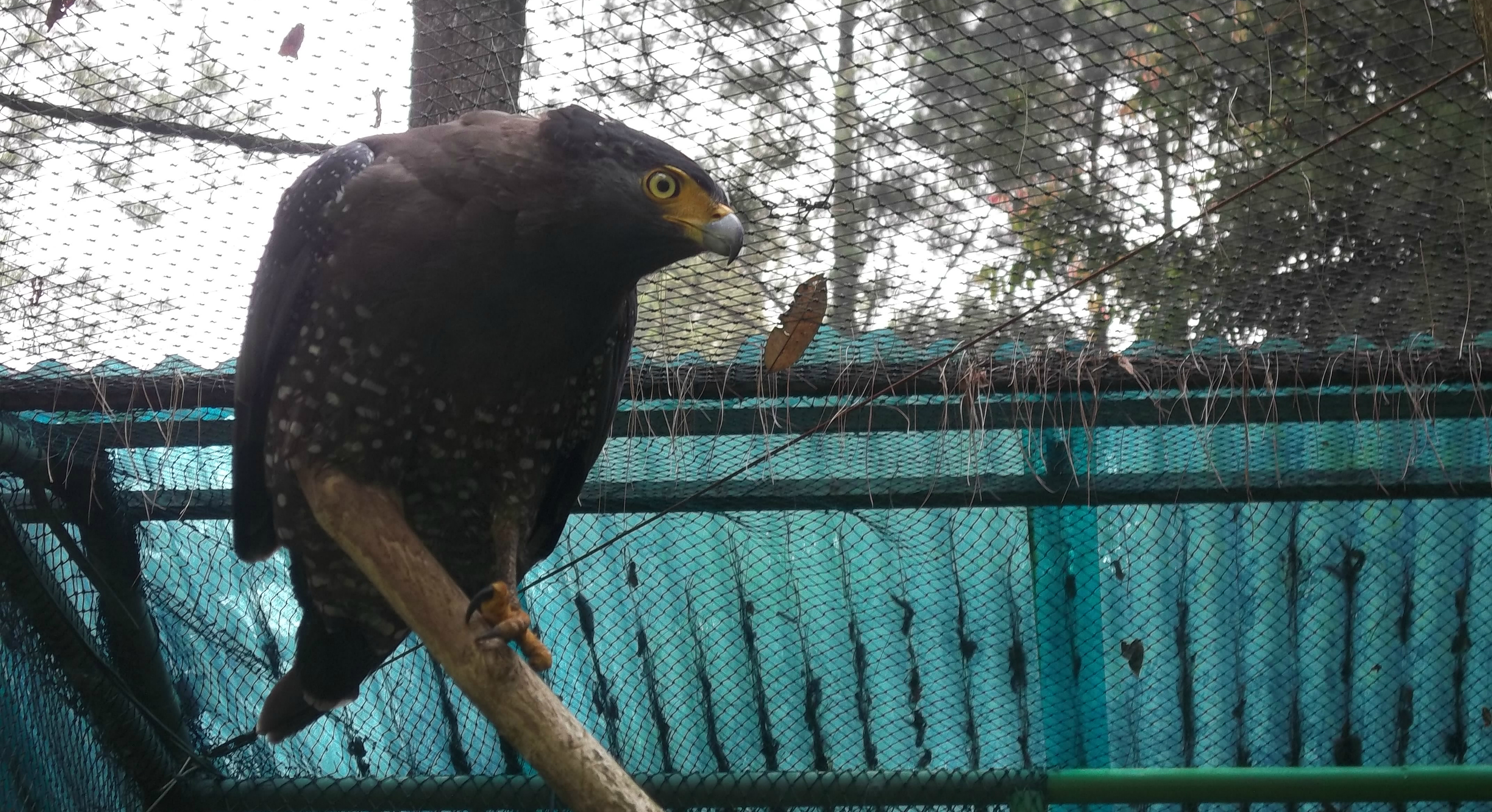 Elang-Ular Bido di Penangkaran Elang Loji, Cigombong.